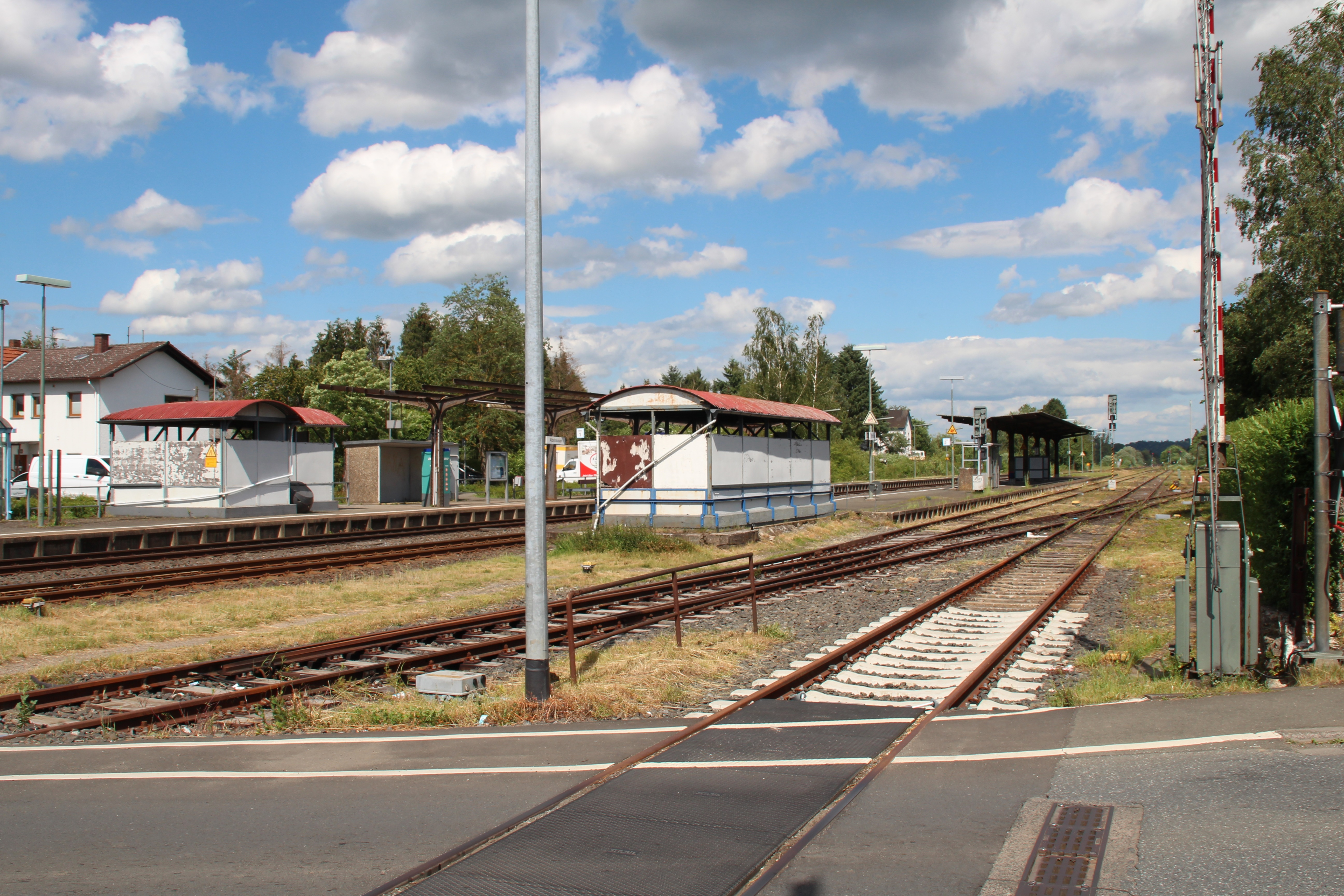 Bahnhof Albshausen, Überblick über die Bahnhofsanlagen vom Bahnübergang der Kreisstraße 828 aus, Standort des ehemaligen Empfangsgebäudes gegenüber der doppelten Kreuzungsweiche am Hausbahnsteig etwa dort, wo heute der Beton-Unterstand steht. In der Fortsetzung des Mittelbahnsteigs zum Bahnübergang hin stand bis 1986 das Fahrdienstleiterstellwerk Af.